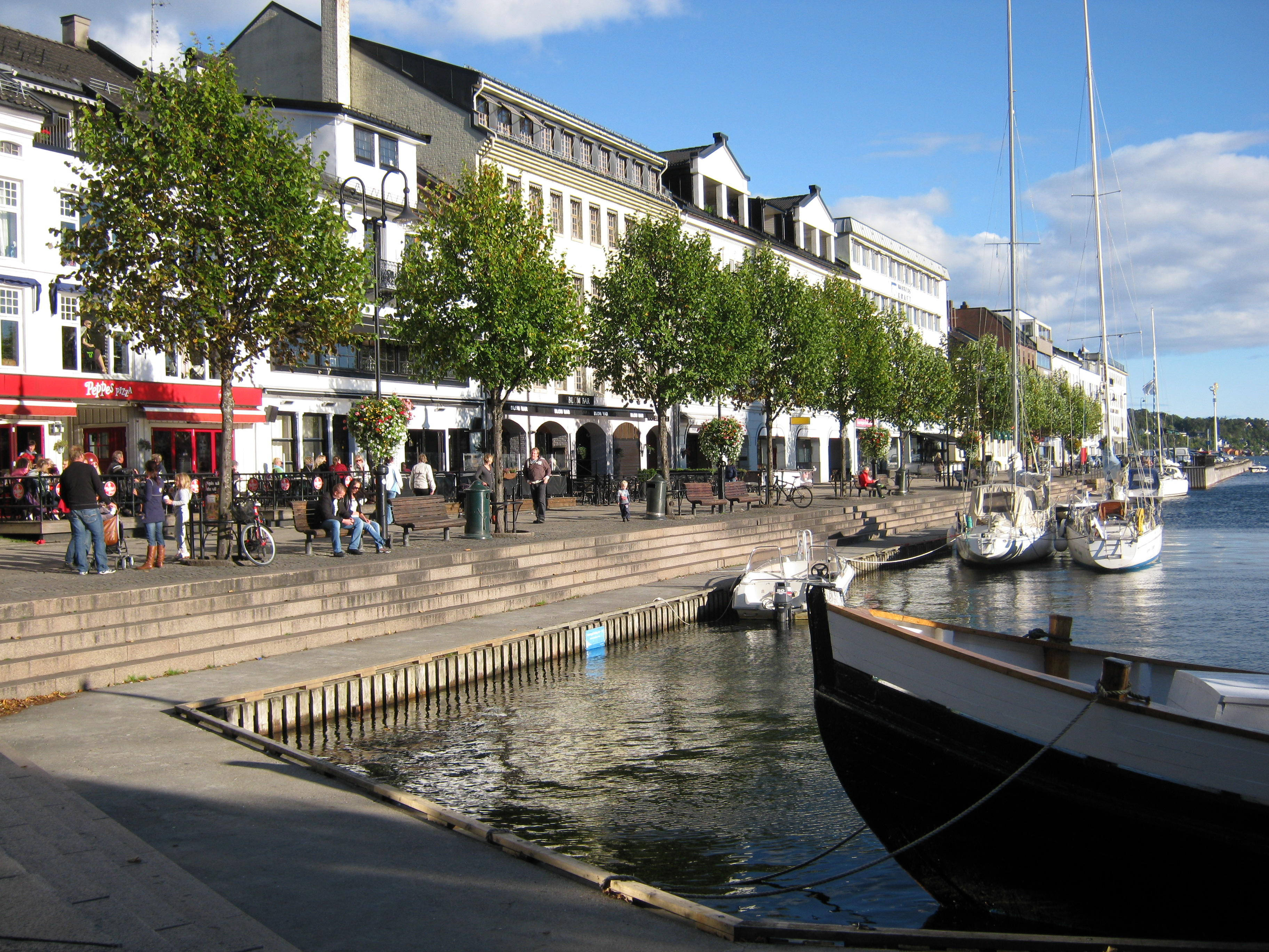 Langbryggen Arendal